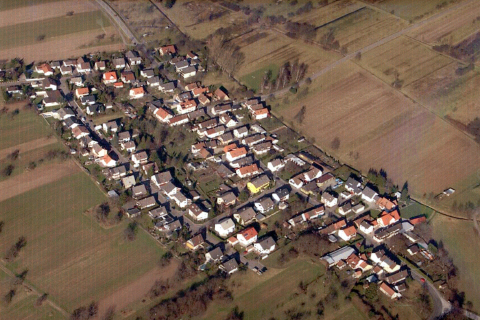 Blick aus dem Heli auf Förch, dem kleinsten Ortsteil von Rastatt.